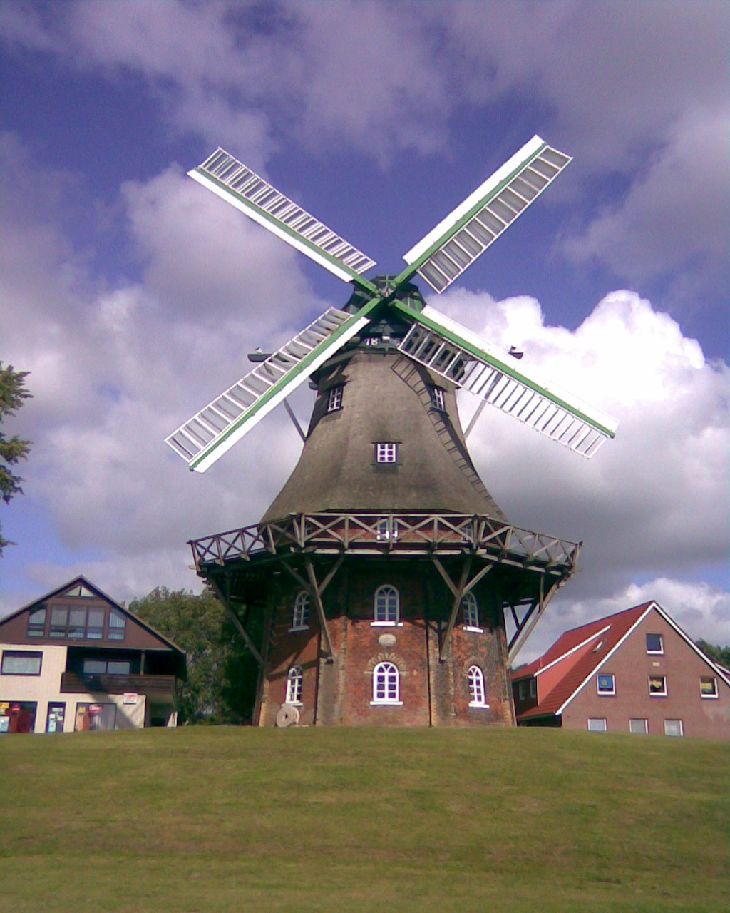 Windmühle in Midlum (Land Wursten, Landkreis Cuxhaven)